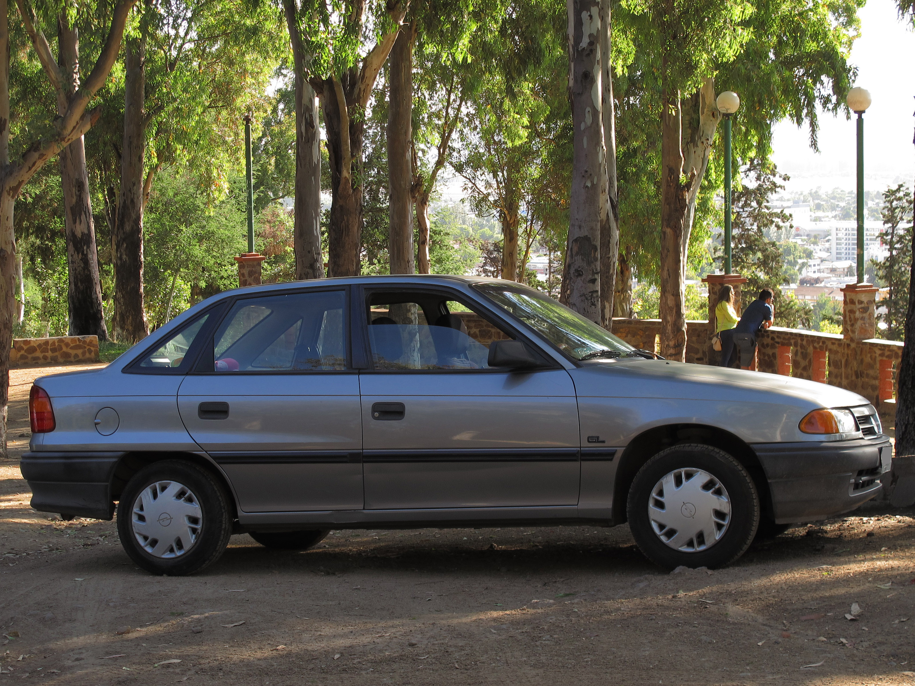 Opel Astra 1.4 GL 1993